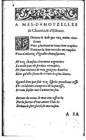 Page Extrait des Amoureuses Occupations